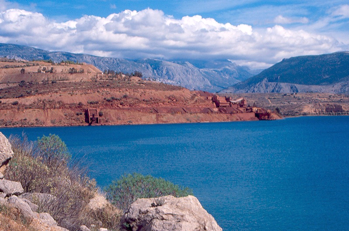 La carrière de bauxite est située au bord du Golfe de Corynthe. A l'arrière-plan, sous les nuages, le Massif du Parnasse et le Mont Olympe.